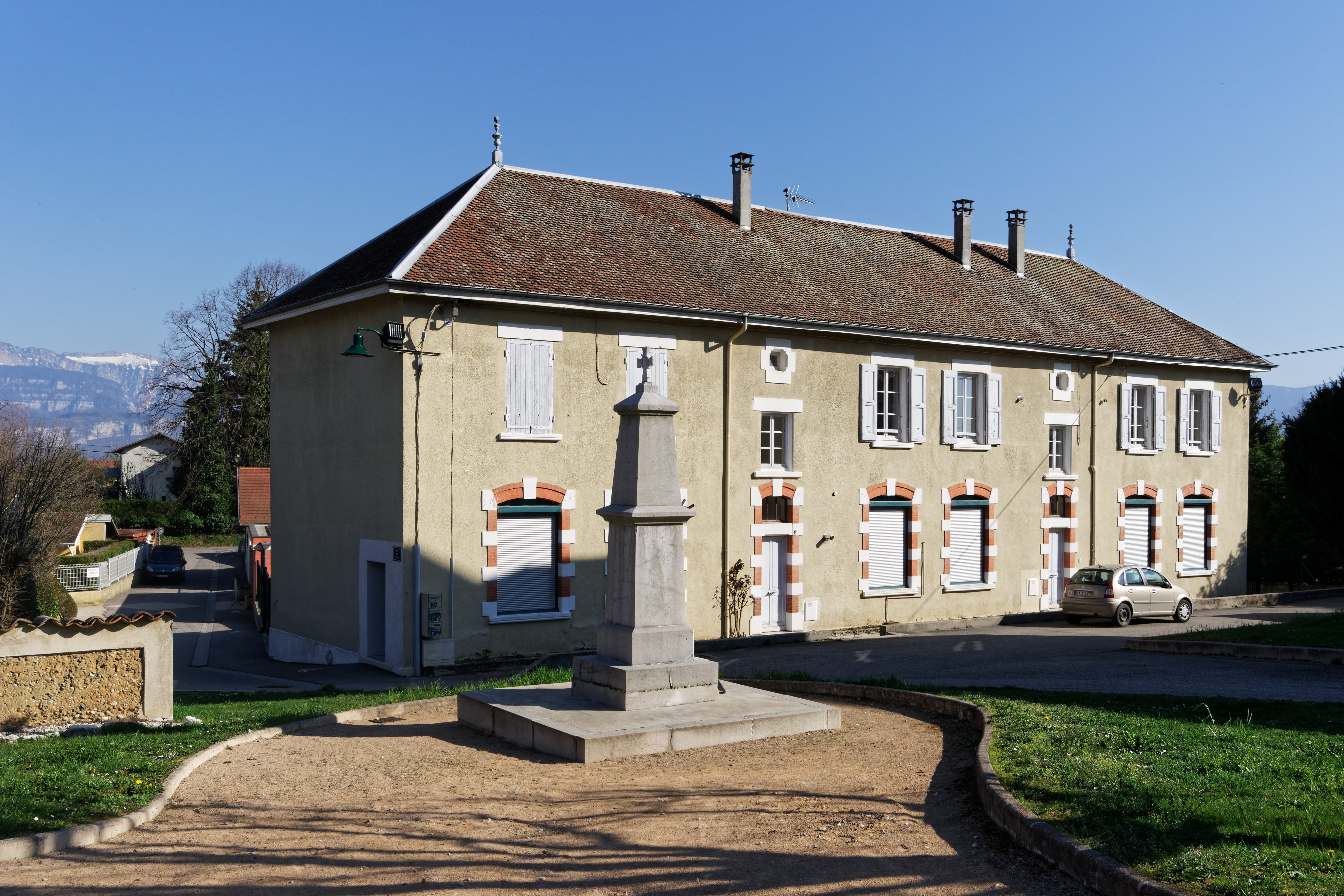 École Paulette Collavet à Saint-Blaise-du-Buis, Isère, France.